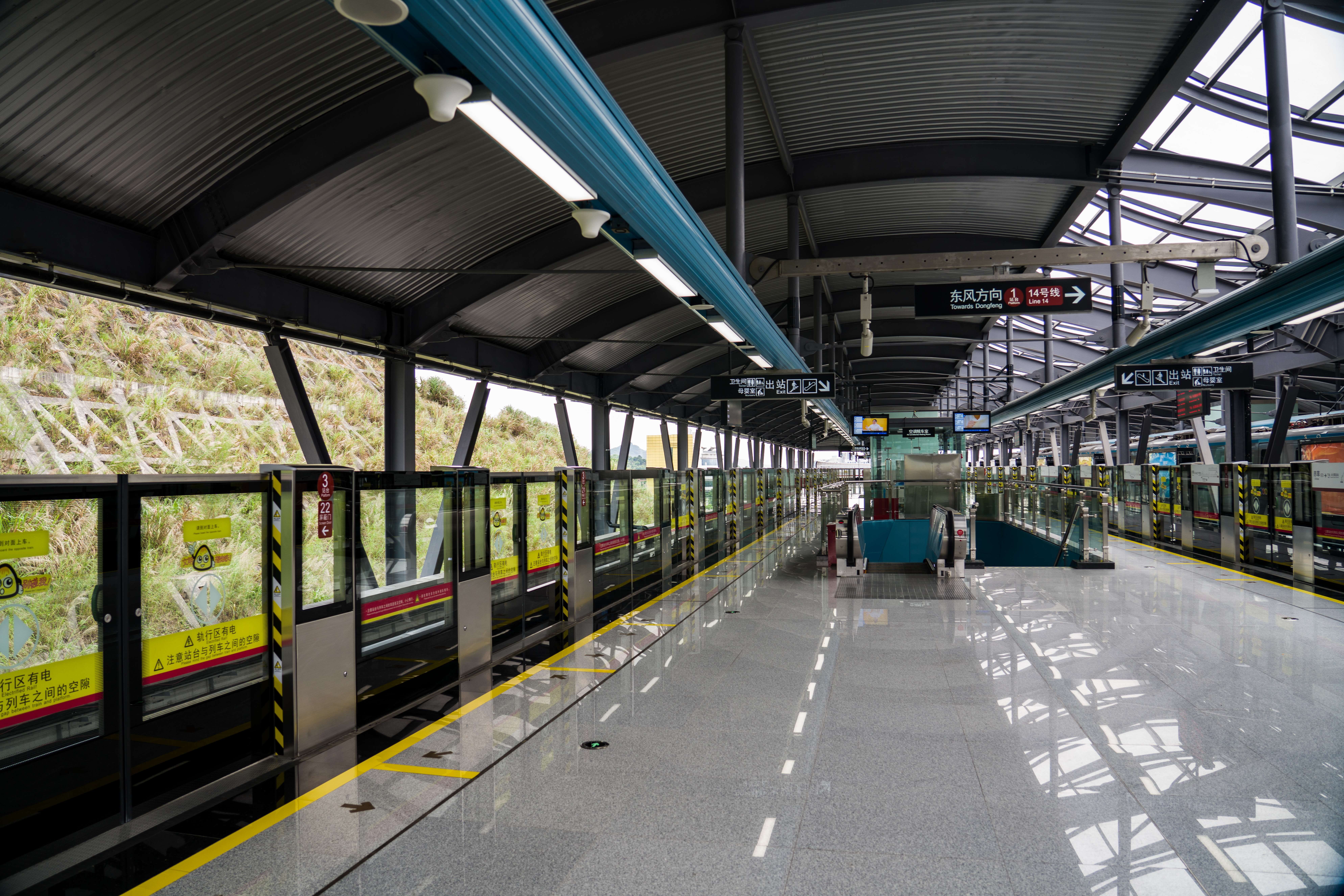 赤草站3号月台